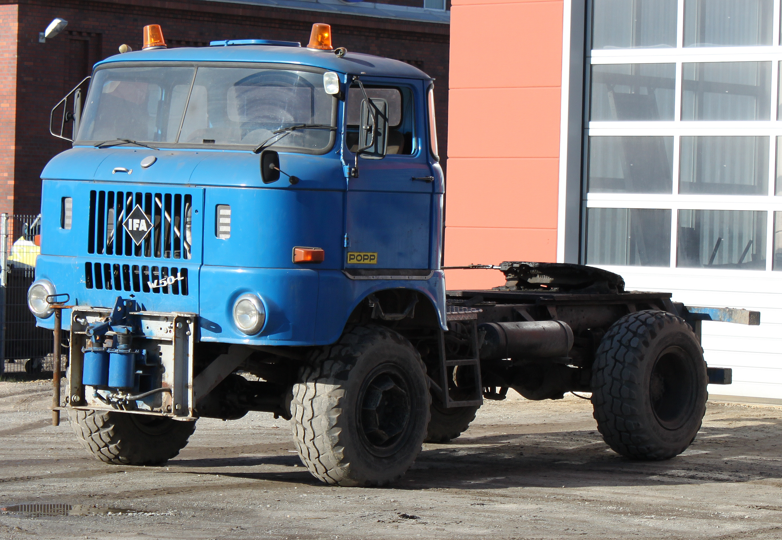 IFA W50 LA als Sattelschlepper